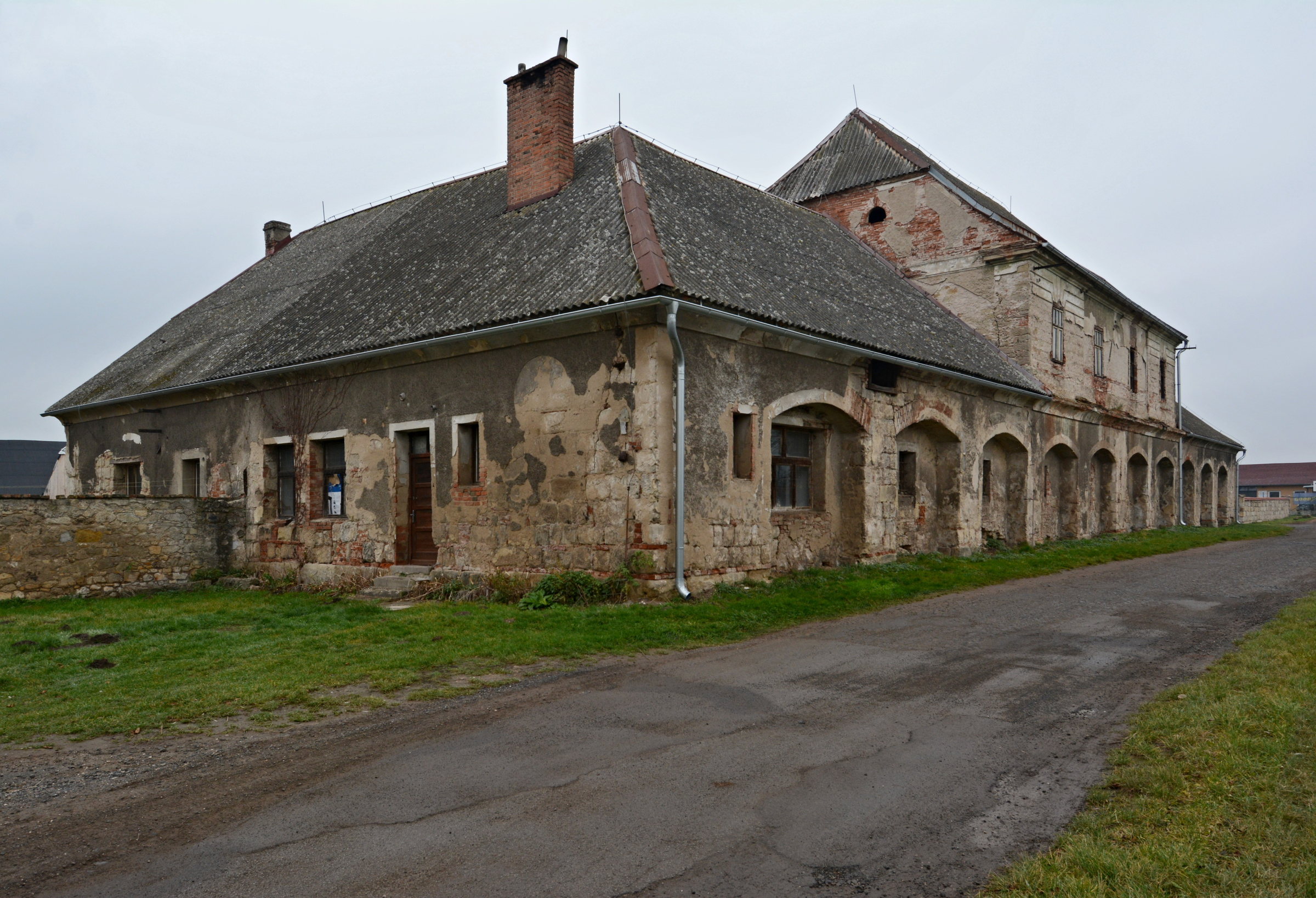 Velkostatek Hněvousice, obytný objekt se stájemi čp. 6, jihovýchodní pohled.